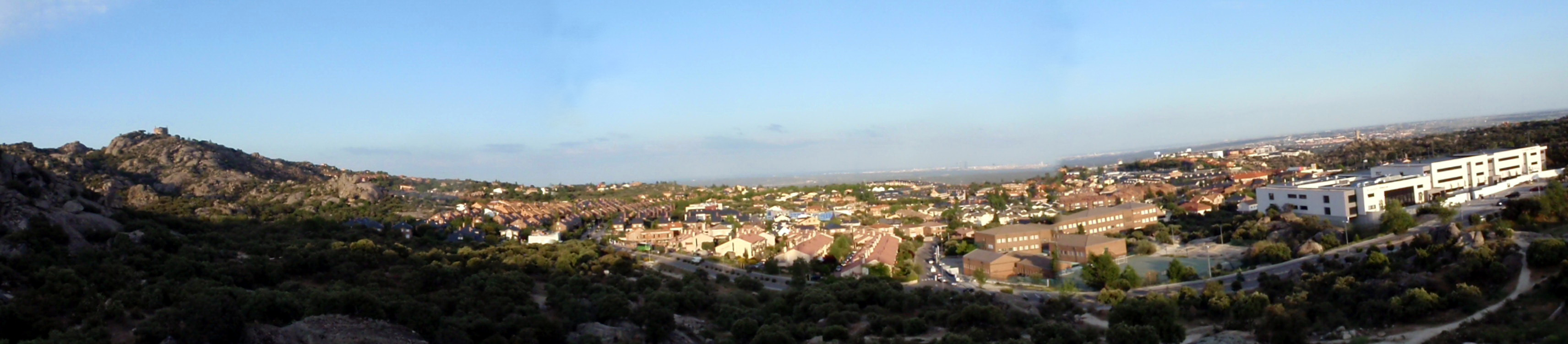 Torrelodones. Vista panorámica del pueblo desde Polideportivo.